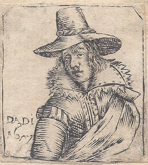 Kupferstich, Selbstporträt des Zürcher Glasmalers Daniel Diebold mit Monogramm DaDi und der Datierung 1653 links unten.